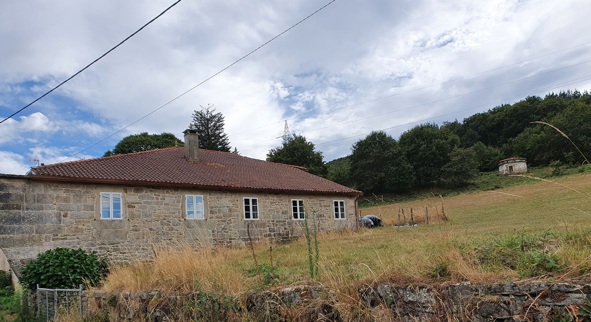 Lugar de Ermide, da parroquia de San Fiz de Amarante.